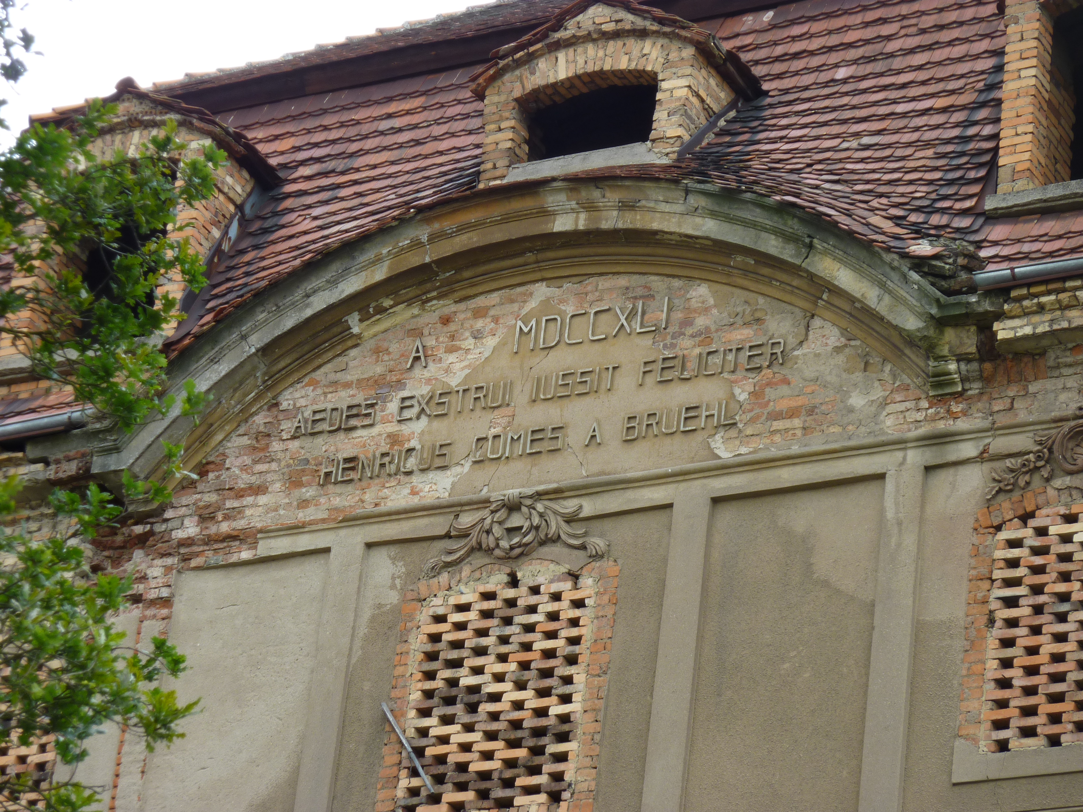 Pałac Brühlów: Inskrypcja pod frontonem na skrzydle południowym: A[D] MDCCXLI AEDES EXSTRUI IUSSIT FELICITER HENRICUS COMES A BRUEHL Dom buduj na szczęściu- inskrypcja upamiętniająca zakup pałacu przez Heinricha von Brühl w 1741 r.